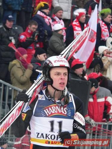 Krystian Długopolski - polski skoczek narciarski podczas Pucharu Świata w skokach narciarskich Zakopane 2005.